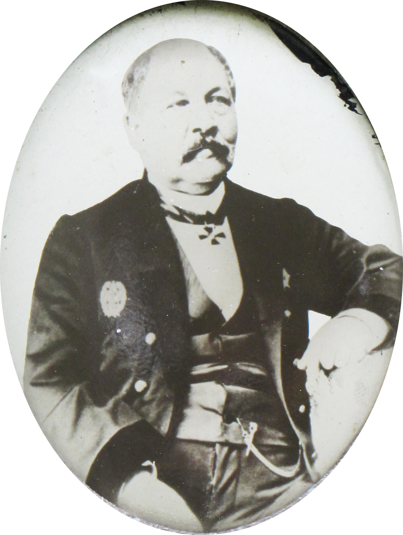 Беларуская (тарашкевіца): Ян Баляслаў Луцкевіч, фота з надмагільнага помніка на Кальварыйскіх могілках у Менску